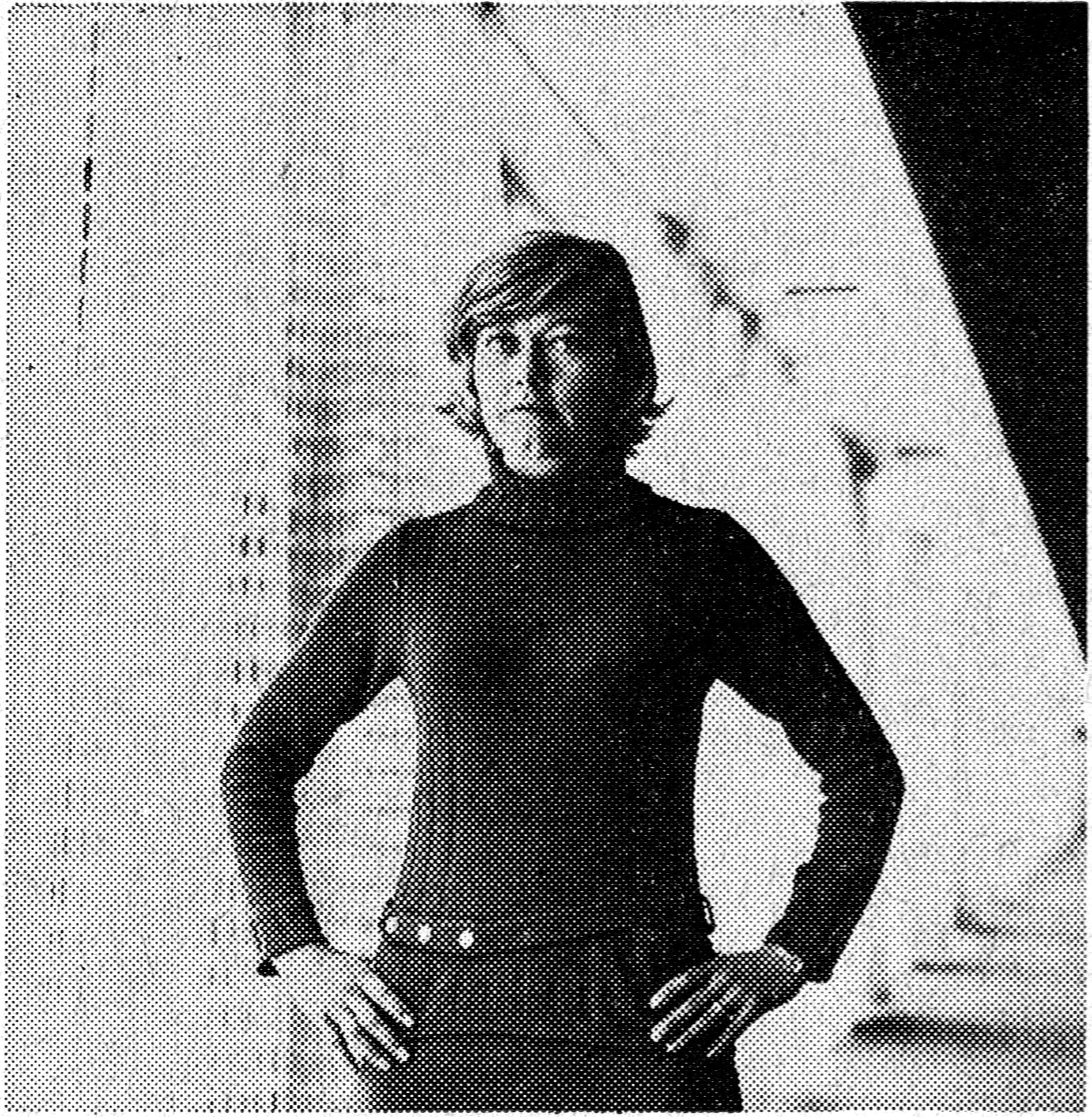 Ittla Frodi